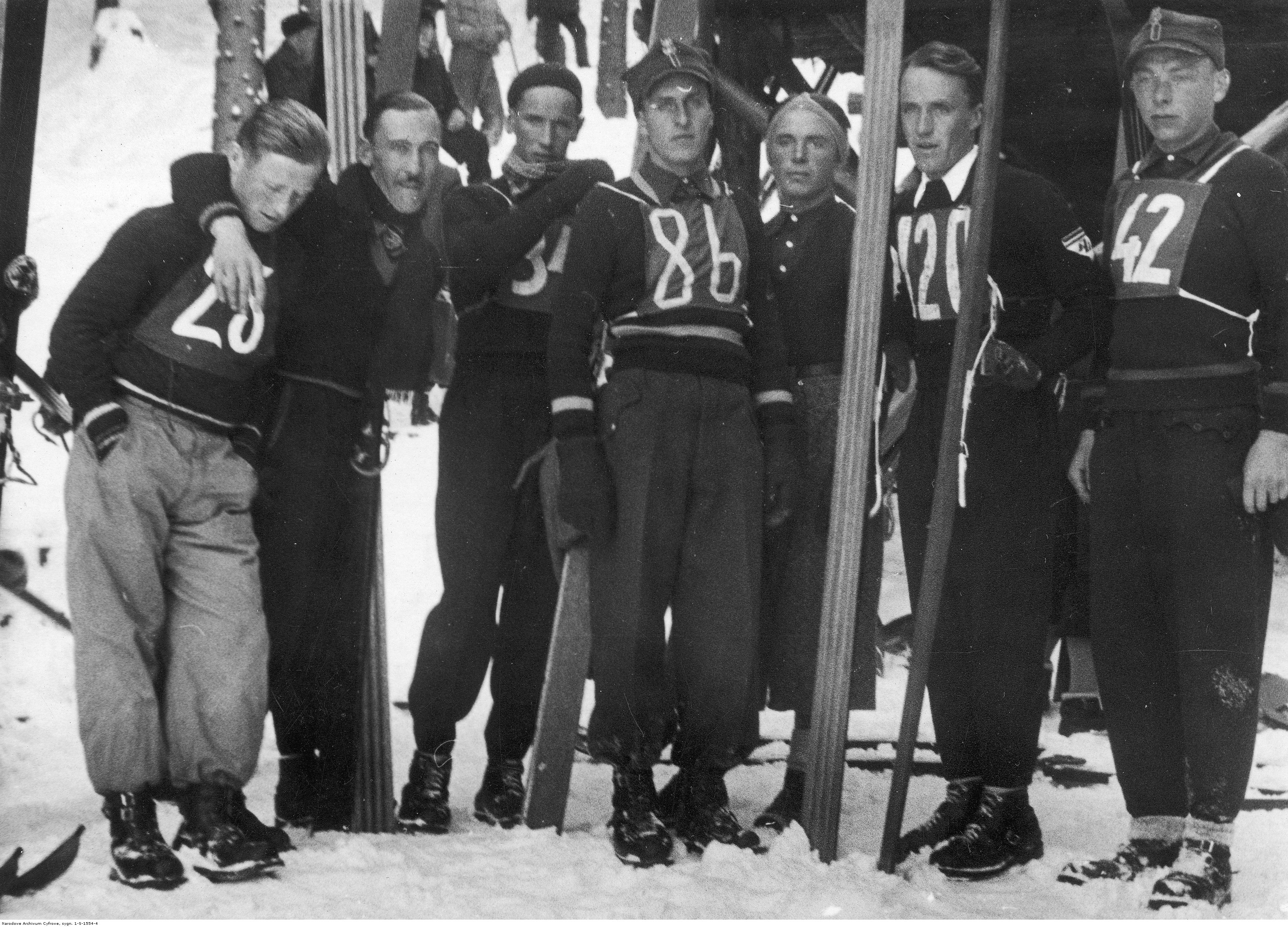 Konkurs skoków narciarskich o Mistrzostwo Polski w Koniakowie. Grupa skoczków w trakcie zawodów. Widoczny m.in. Bronisław Czech (4. z lewej) (Koncern Ilustrowany Kurier Codzienny - Archiwum Ilustracji)